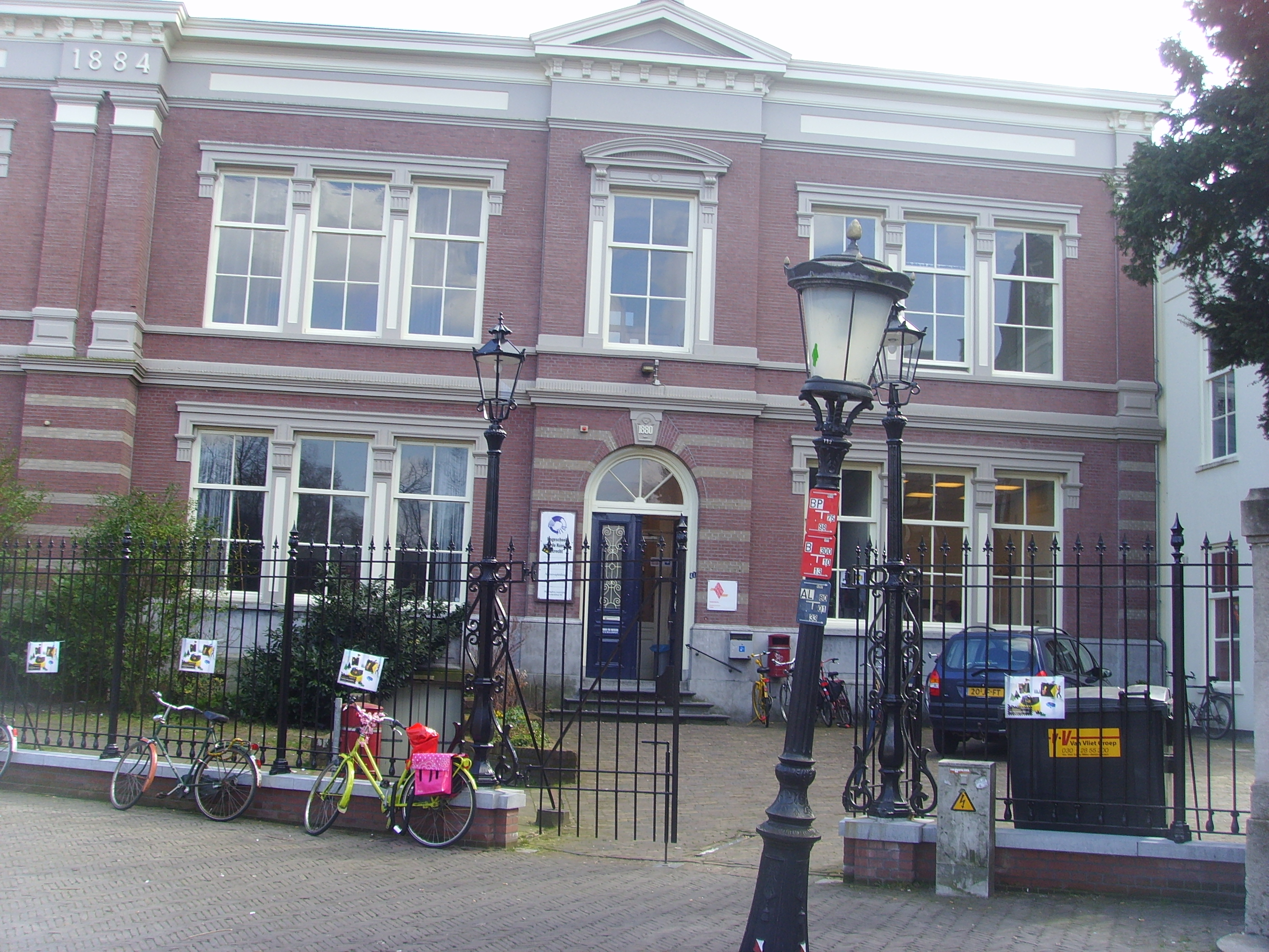 Utrechtse Hogeschool voor de Kunsten, Janskerkhof (Utrecht)